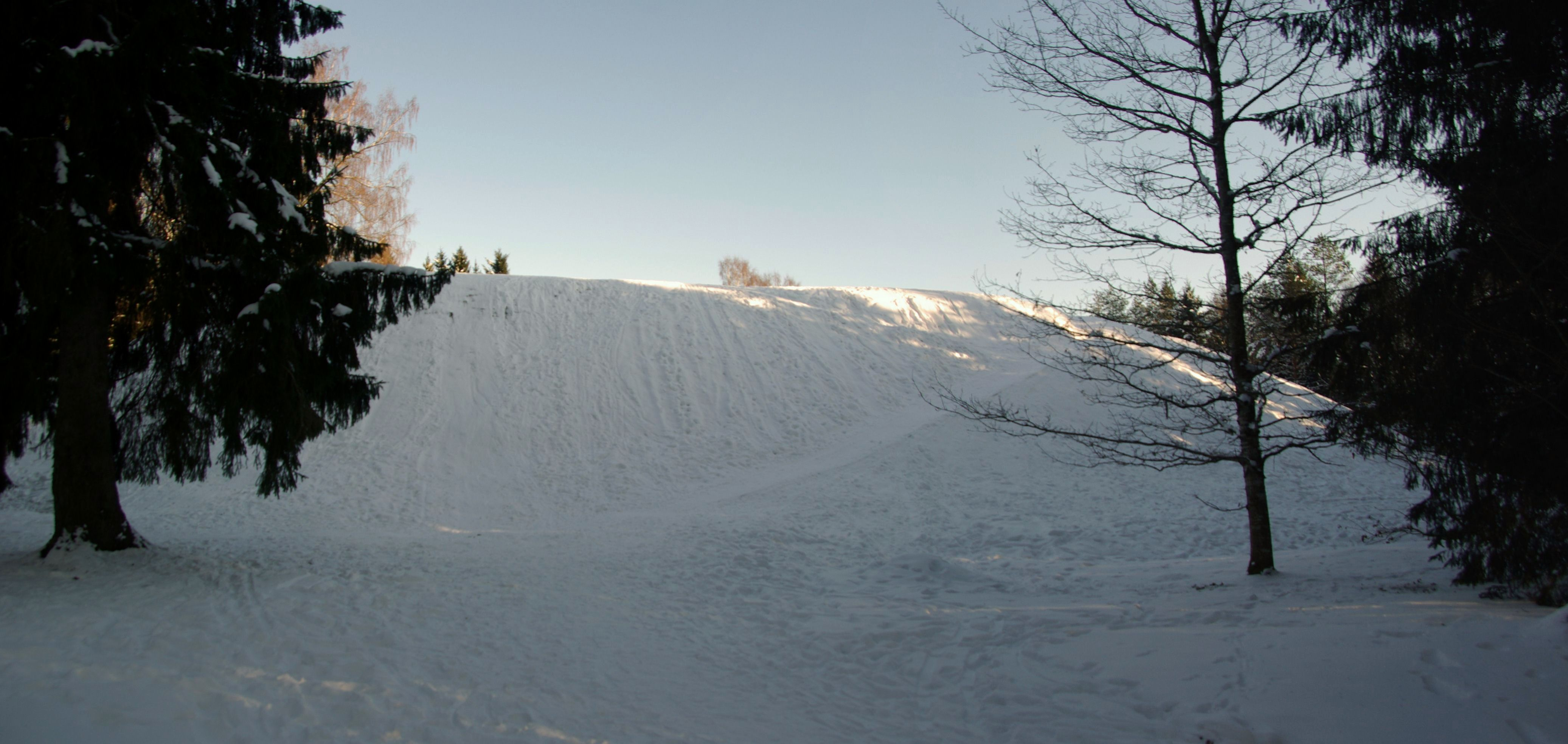 Lõhavere Linnamägi, asub Suure-Jaani lähedal umbes 2 km Lõhavere mõisast idas Putku oja käärus loodusliku seljaku otsal. 1600 m2 suurust õue ümbritsevad 1–1,5 m kõrgused vallijäänused.